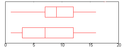 Exemple de boîtes à moustaches. Image personnelle créée avec gnuplot et gimp.